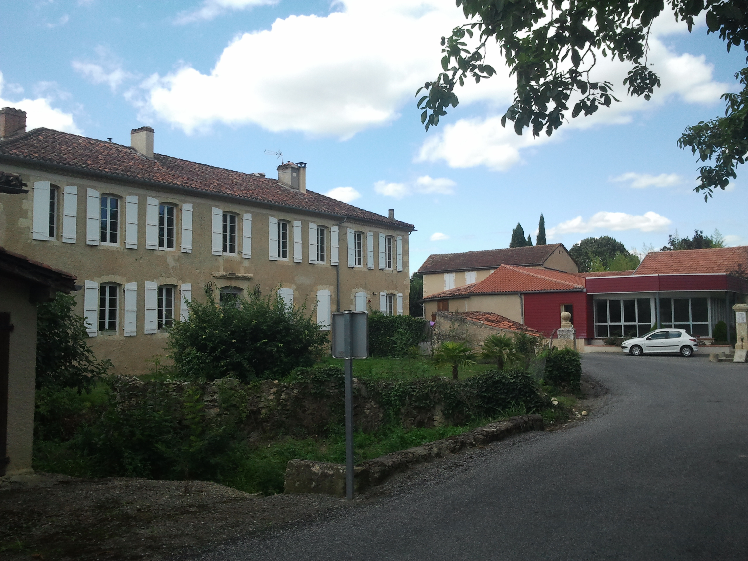 Rue du village à Boucagnères